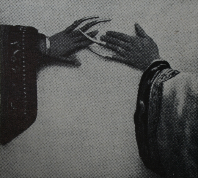 Fotografie E. S. Vráze z knihy Bílý ďábel v Pekingu - Ruce mandžuských vznešených dam s pěstěnými dlouhými nehty ve stříbrných pouzdrech.